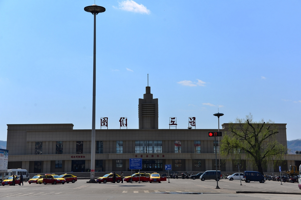 吉林省图们站